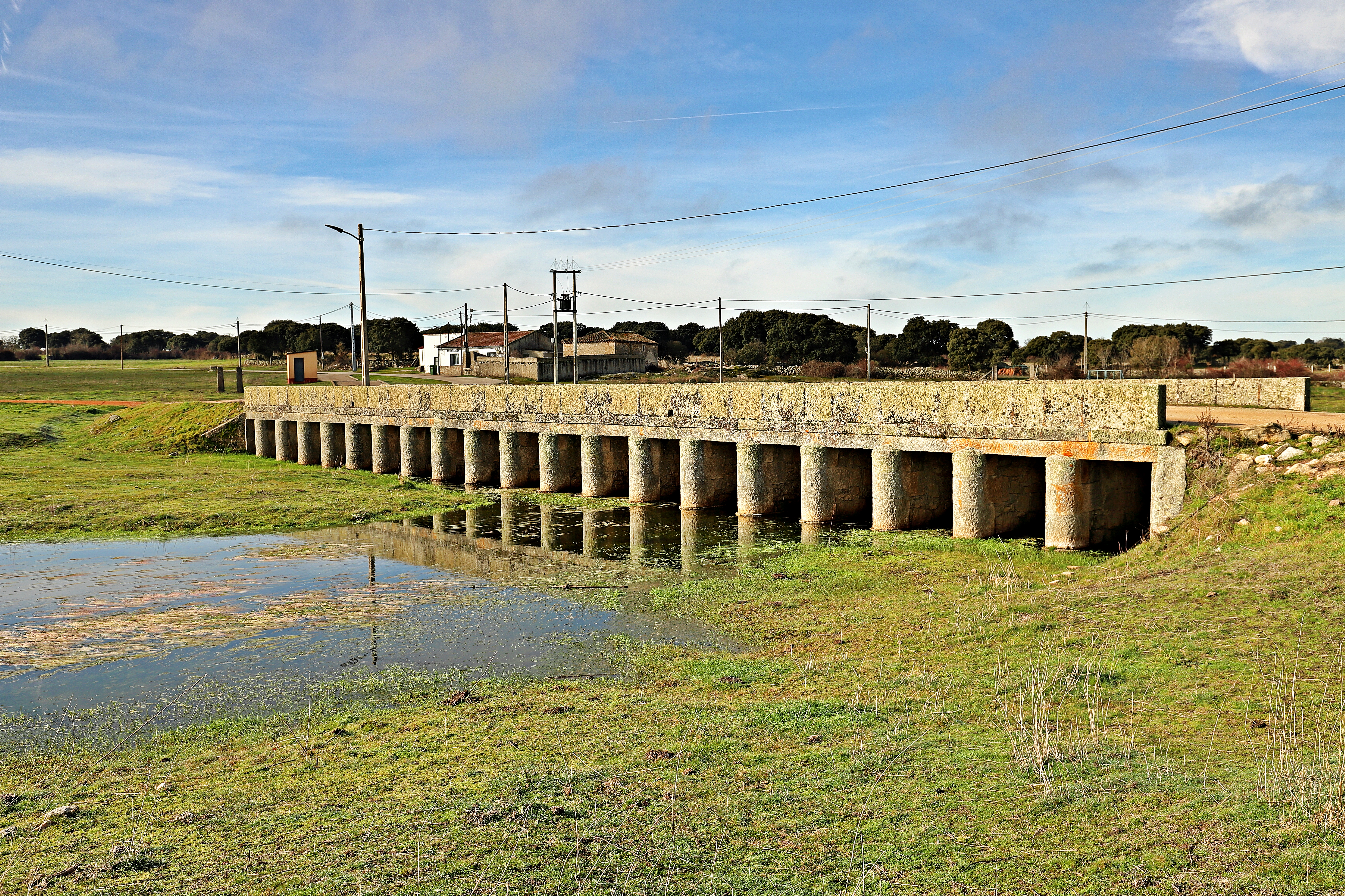 Espadaña